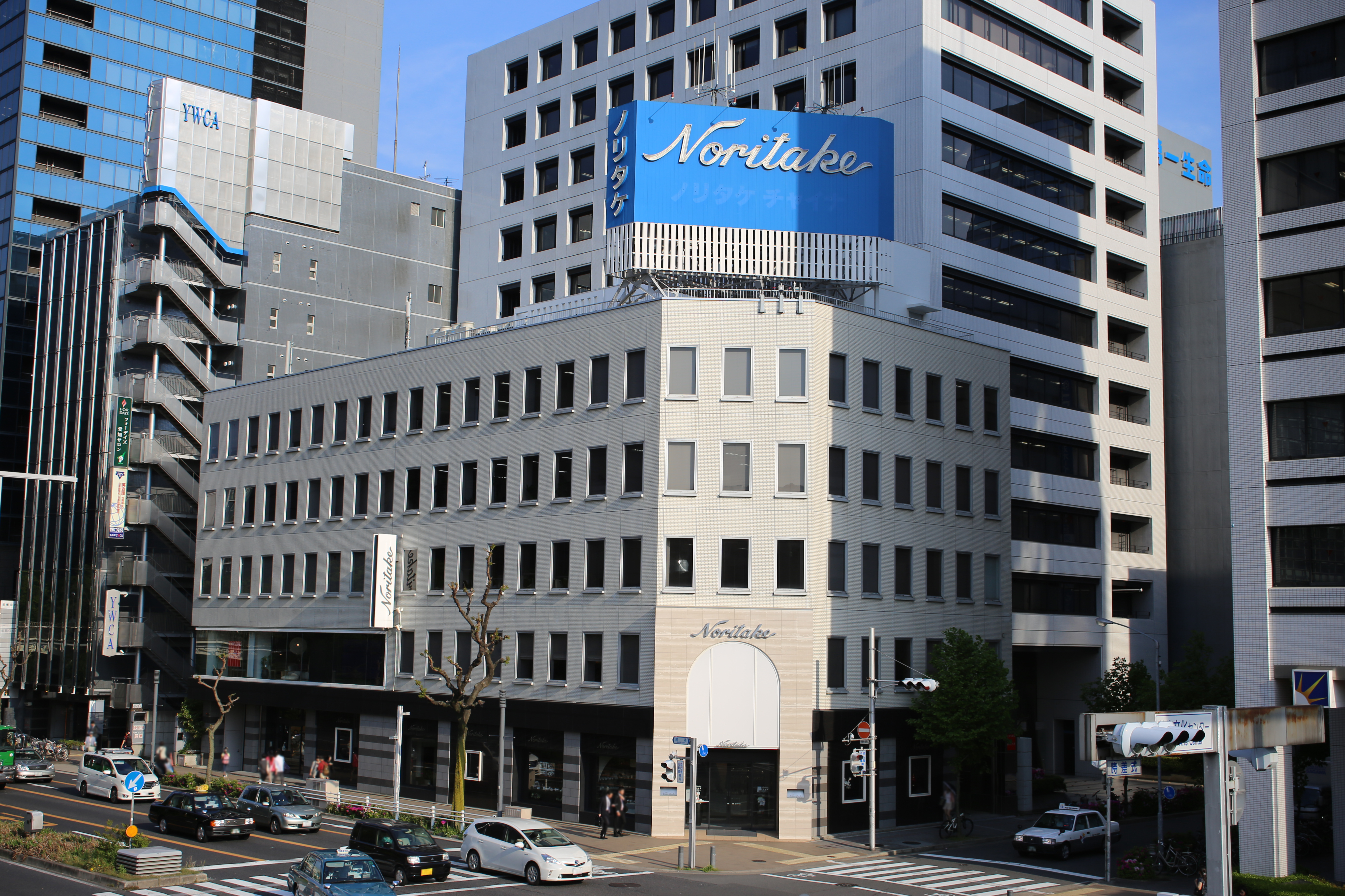 名古屋市中区新栄町のノリタケ栄ビルを北側公道（歩道橋）西側より撮影。ただし、人物およびナンバープレートにつき画像処理済み。